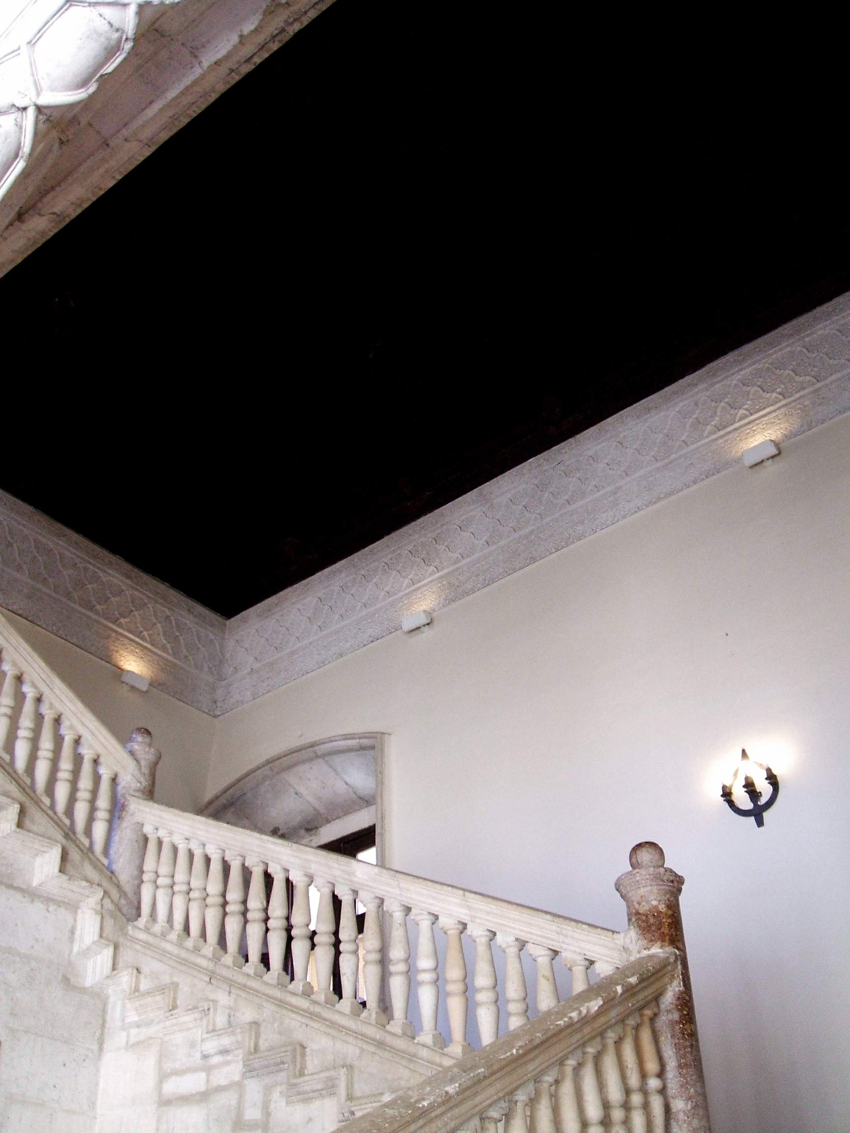 Escalera del patio del Palacio de los Condes de Miranda, en Peñaranda de Duero (Burgos)